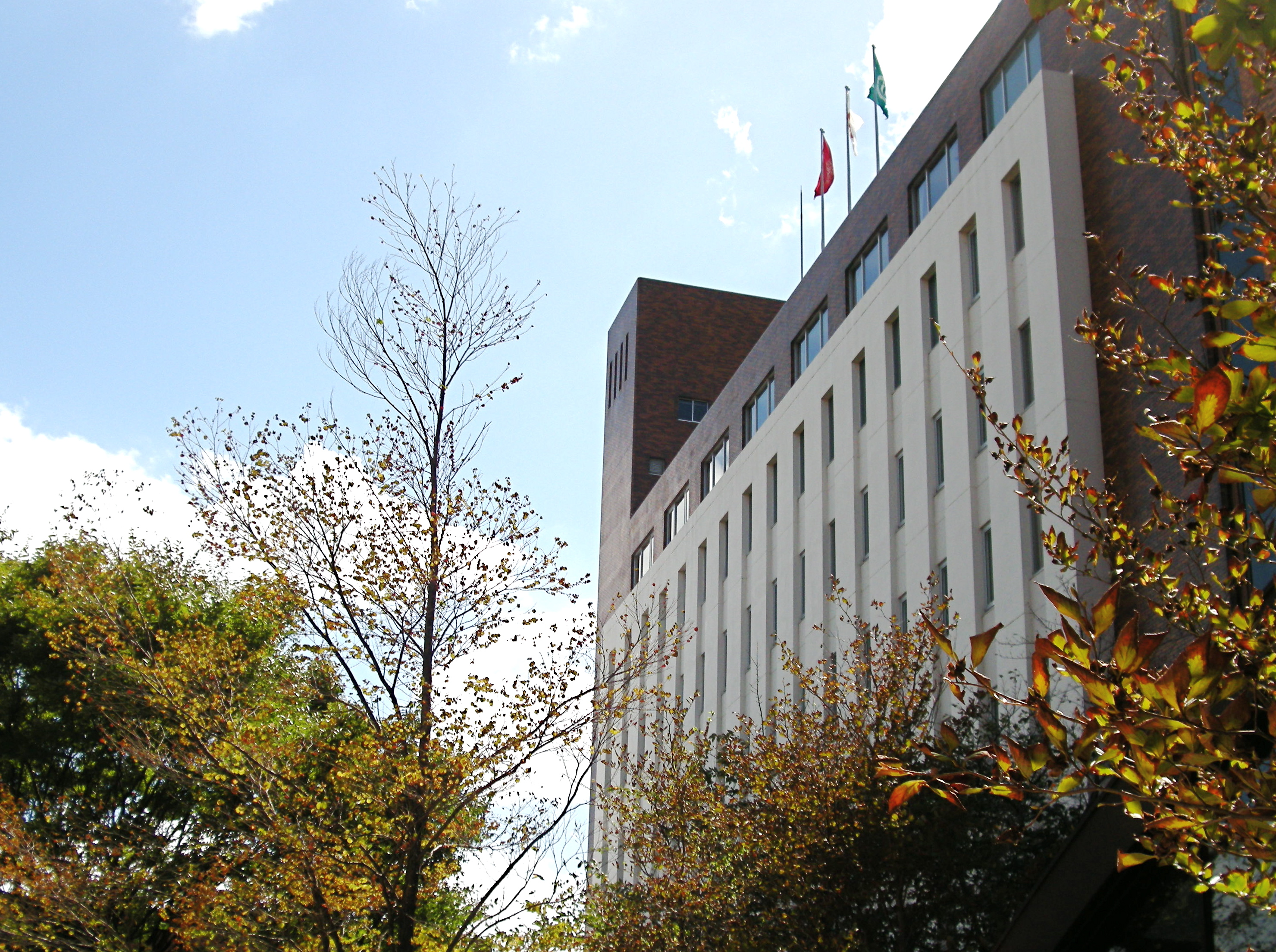 Main Building of Osaka Gakuin University (Osaka, Japan)